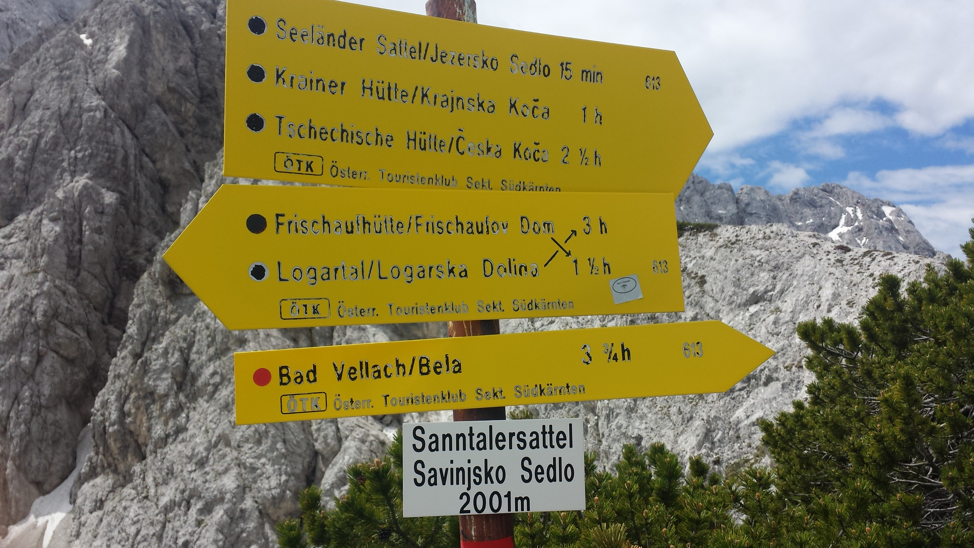 Savinjsko sedlo 2001 m. n. m. Levo pot na Okrešelj, desno pot na Ledine.